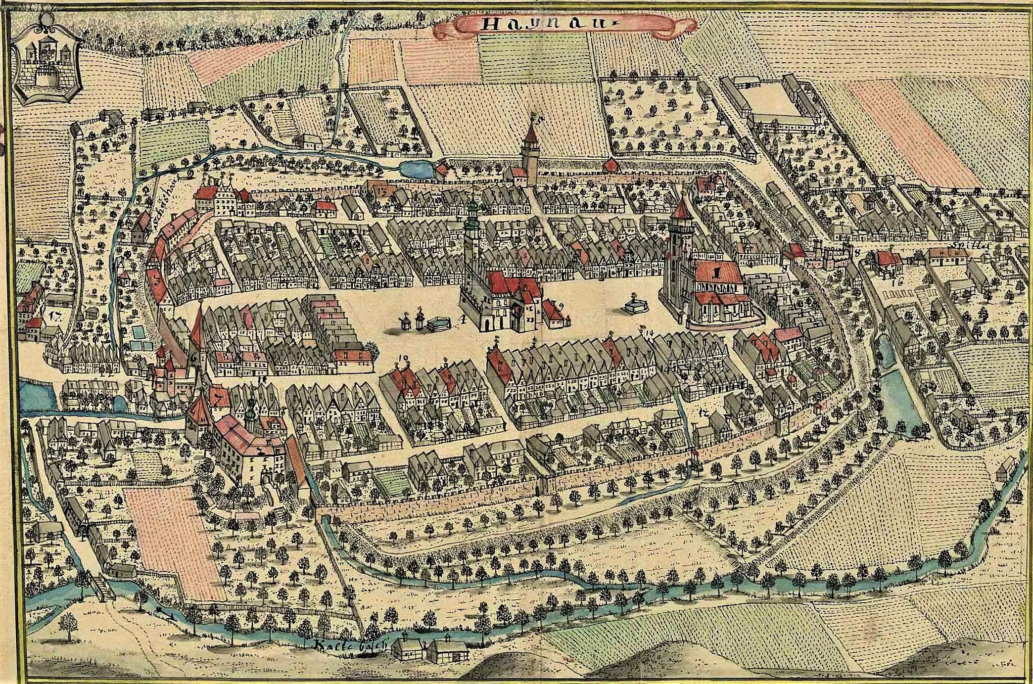 Rysunek przedstawiający miasto Chojnów, sporządzony przez Friedricha Bernharda Wernhera i umieszczony w Topographia oder Prodromus Delineati Principatus Lignicensis Bregensis, et Wolaviensis [...]